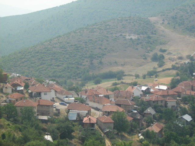 Панорама на селото Брест, автор Корисник:Брест